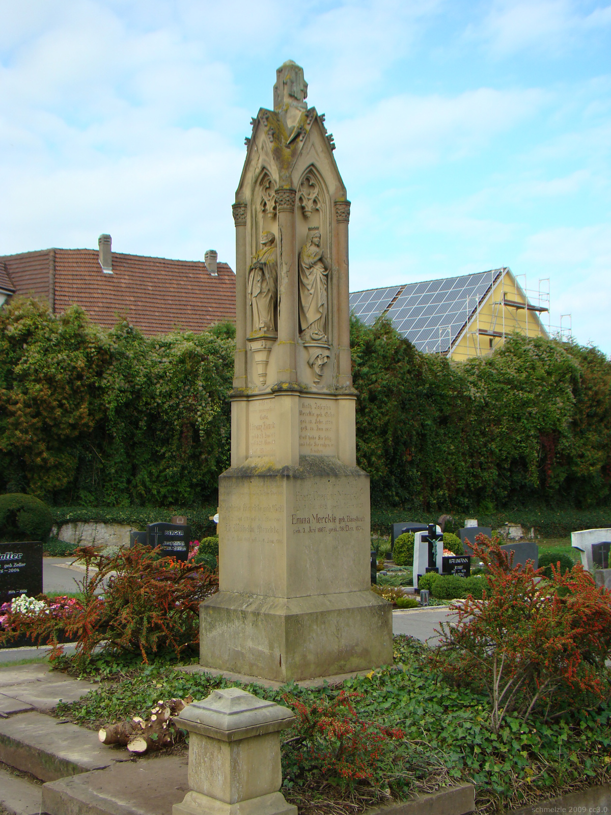 Merckle-Grabmal auf dem Friedhof in Neudenau, von Bildhauer Zartmann